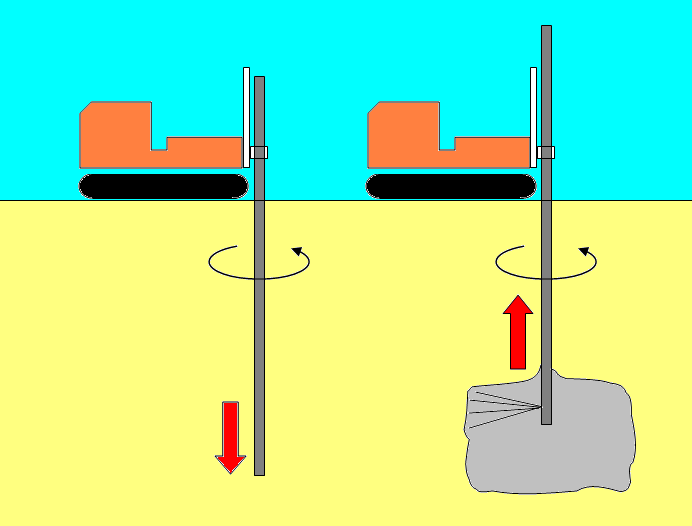 Plaatje van het jetgroutproces, getekend door Wikipediagebruiker: GeeKaa 31 aug 2005 12:26 (CEST)